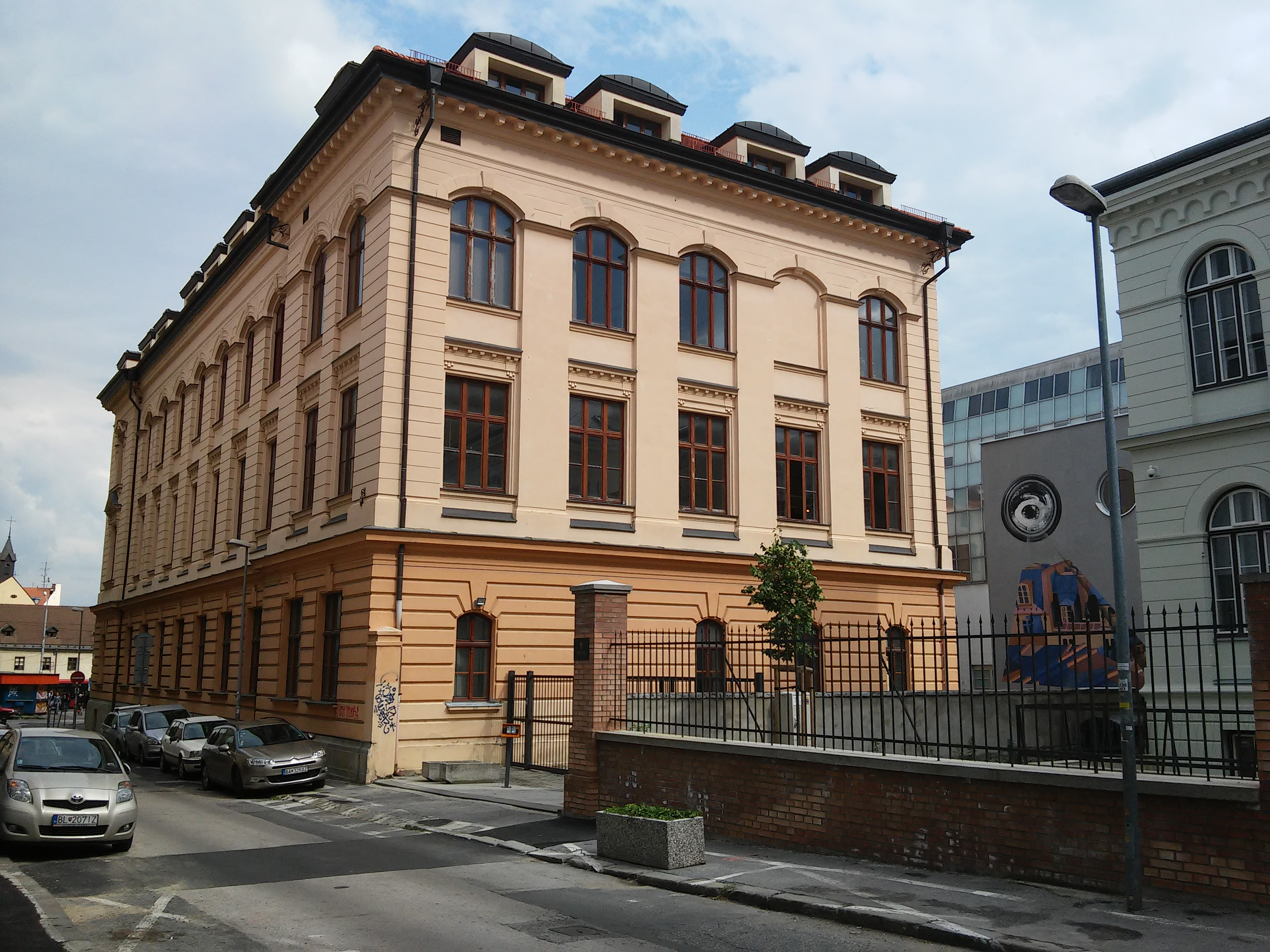 Zochova, Staré Mesto, Bratislava